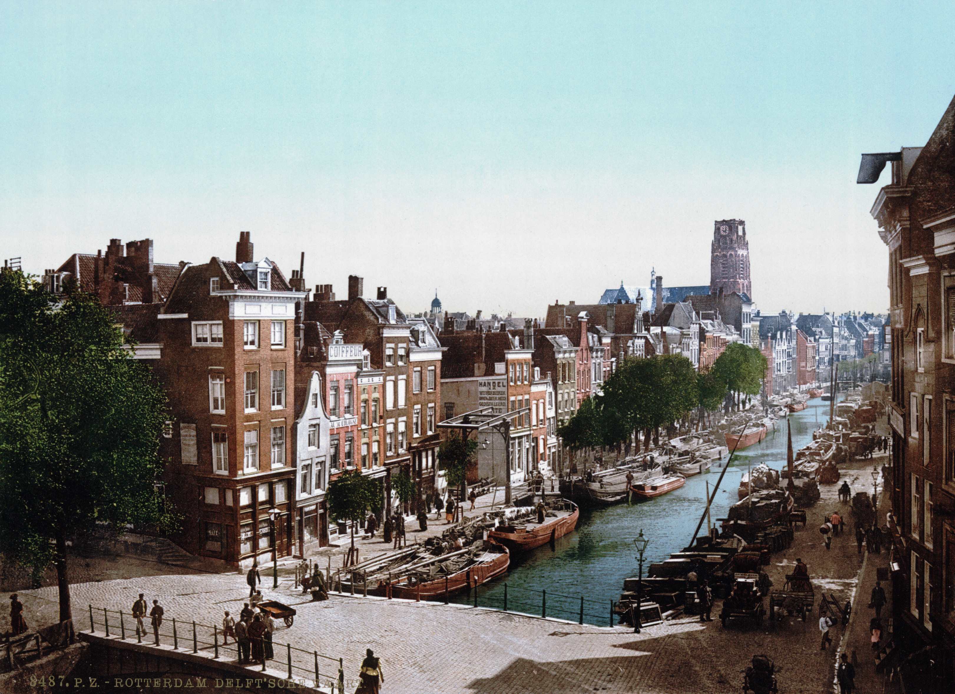 Rotterdam - Delfsevaart